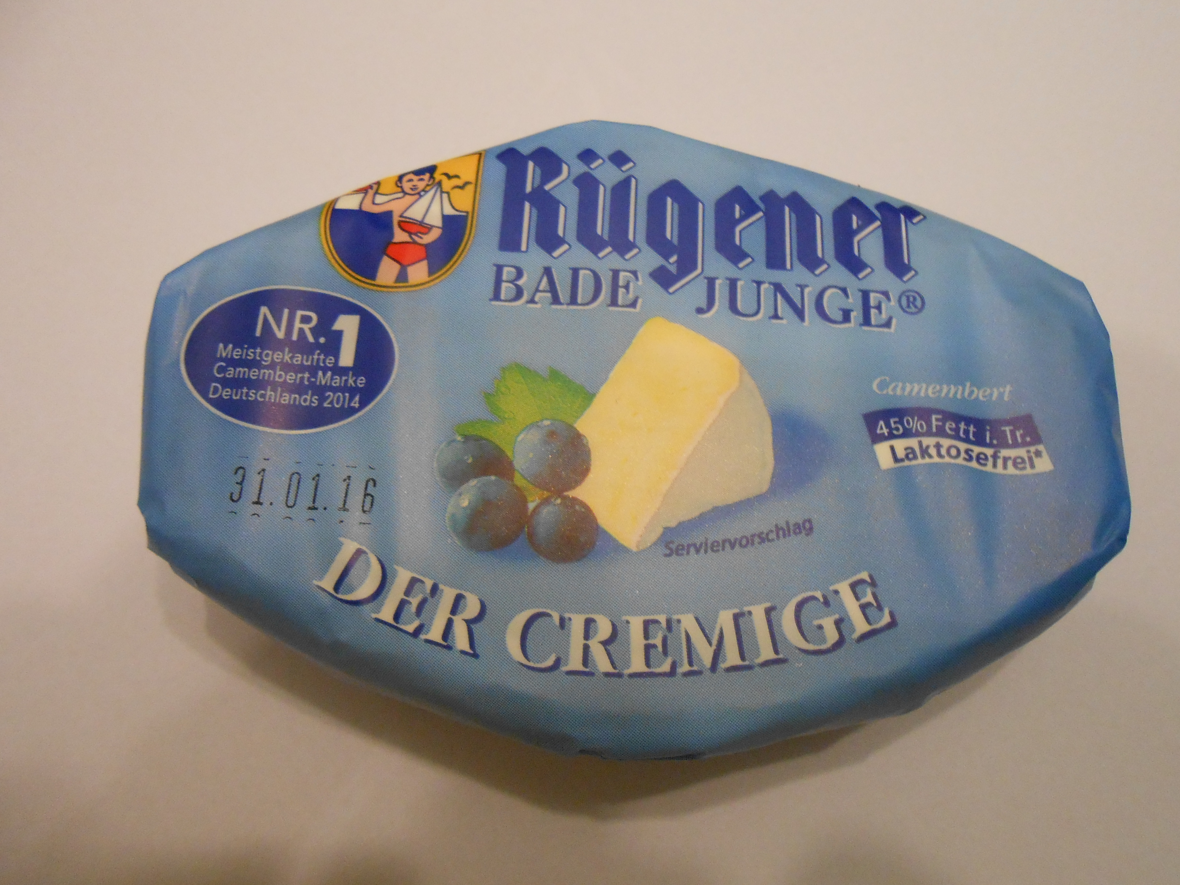 Rügener Badejunge - Sorte "Der Cremige" - Camembert